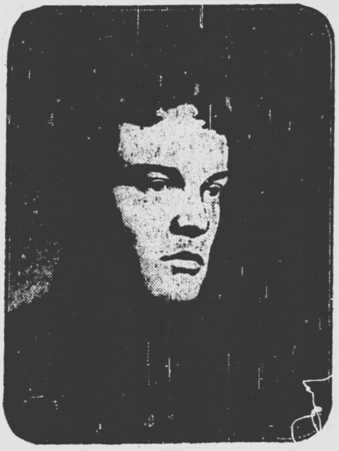 Portrait photographique de René Crevel, publié en juin 1933.